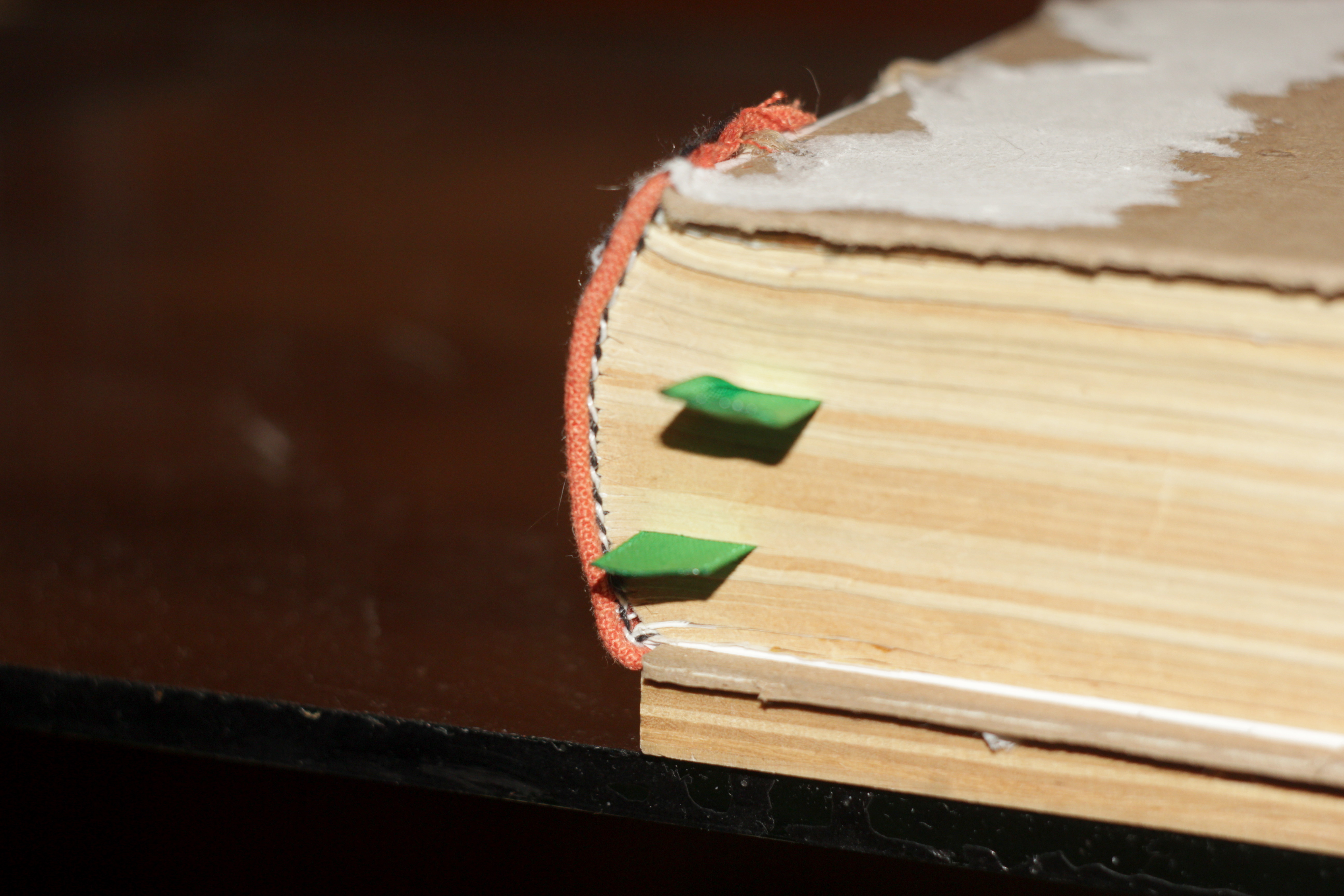 Каптал из полоски ткани, обёрнутой вокруг шнура и пришитой нитками